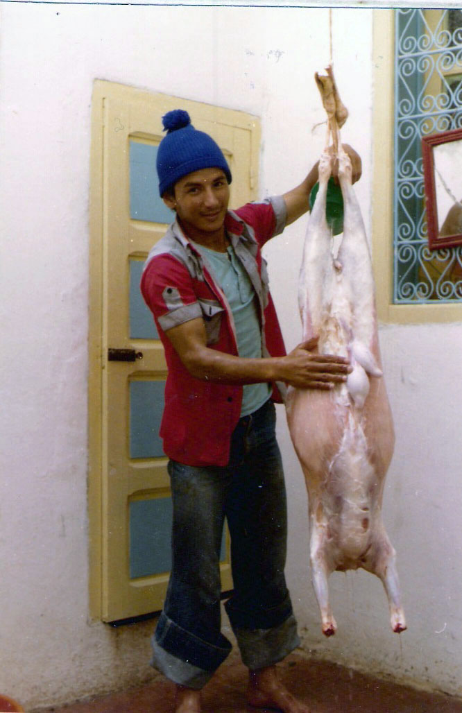 Walon: bedot schoircî pindou al fiesse di l' ofrixhaedjeلمغربية: حولي ديال لعيد مسلوخ و معلّق